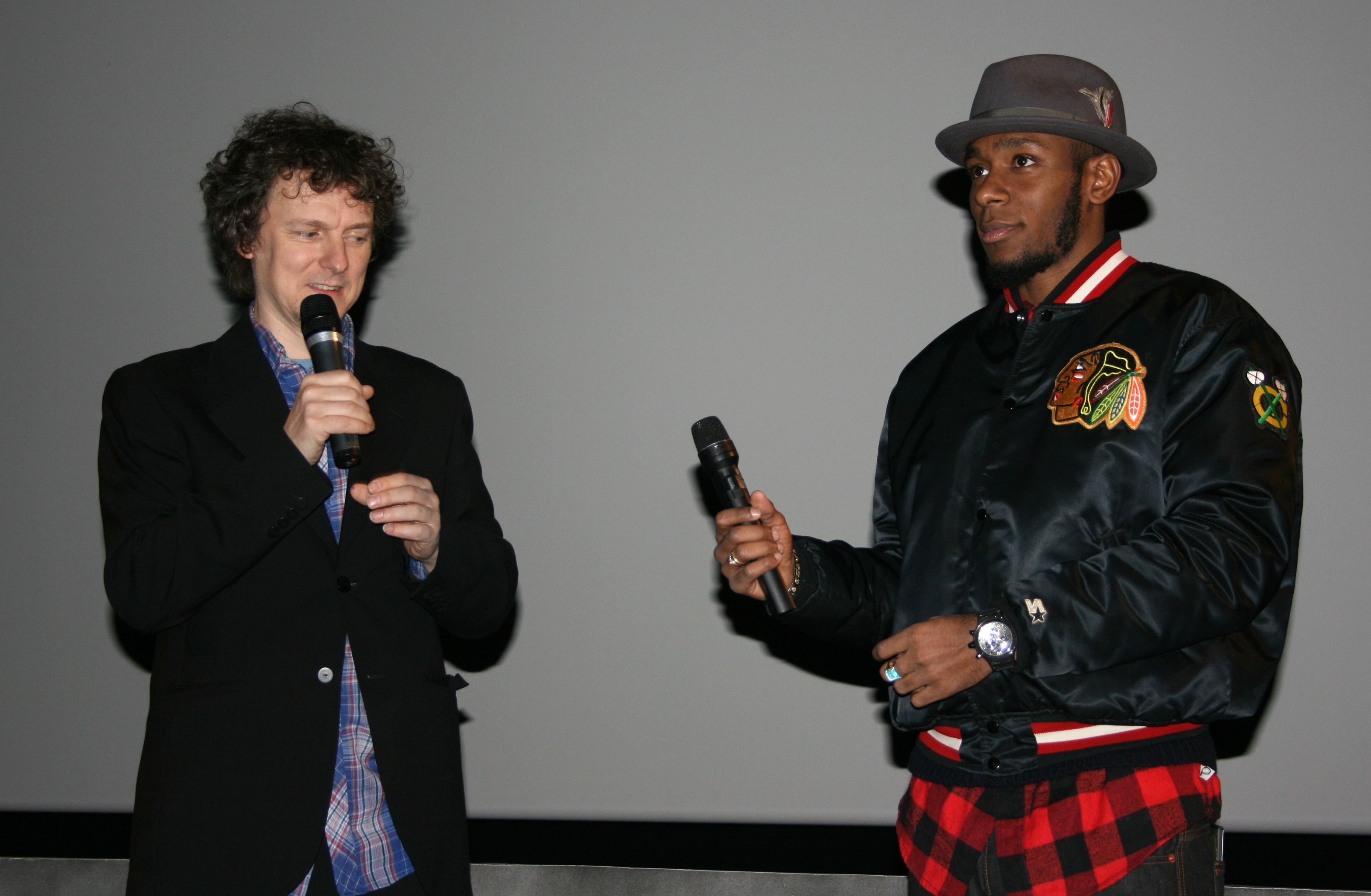 Michel Gondry et Mos Def à l'avant-première de Soyez sympas, rembobinez diffusée à l'UGC Ciné Cité Les Halles, à Paris.